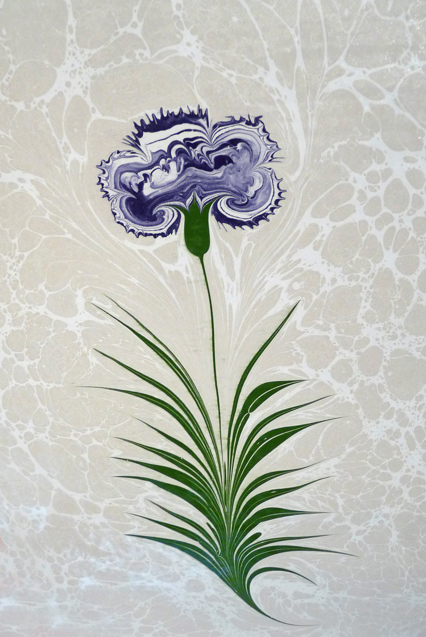 Démonstration de la technique de l'ebru (papier marbré traditionnel turc) dans le cadre du Festival international de géographie 2012 à Saint-Dié-des-Vosges (pays invité : la Turquie)